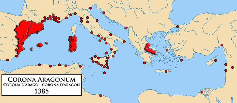 Territori della Corona d'Aragona